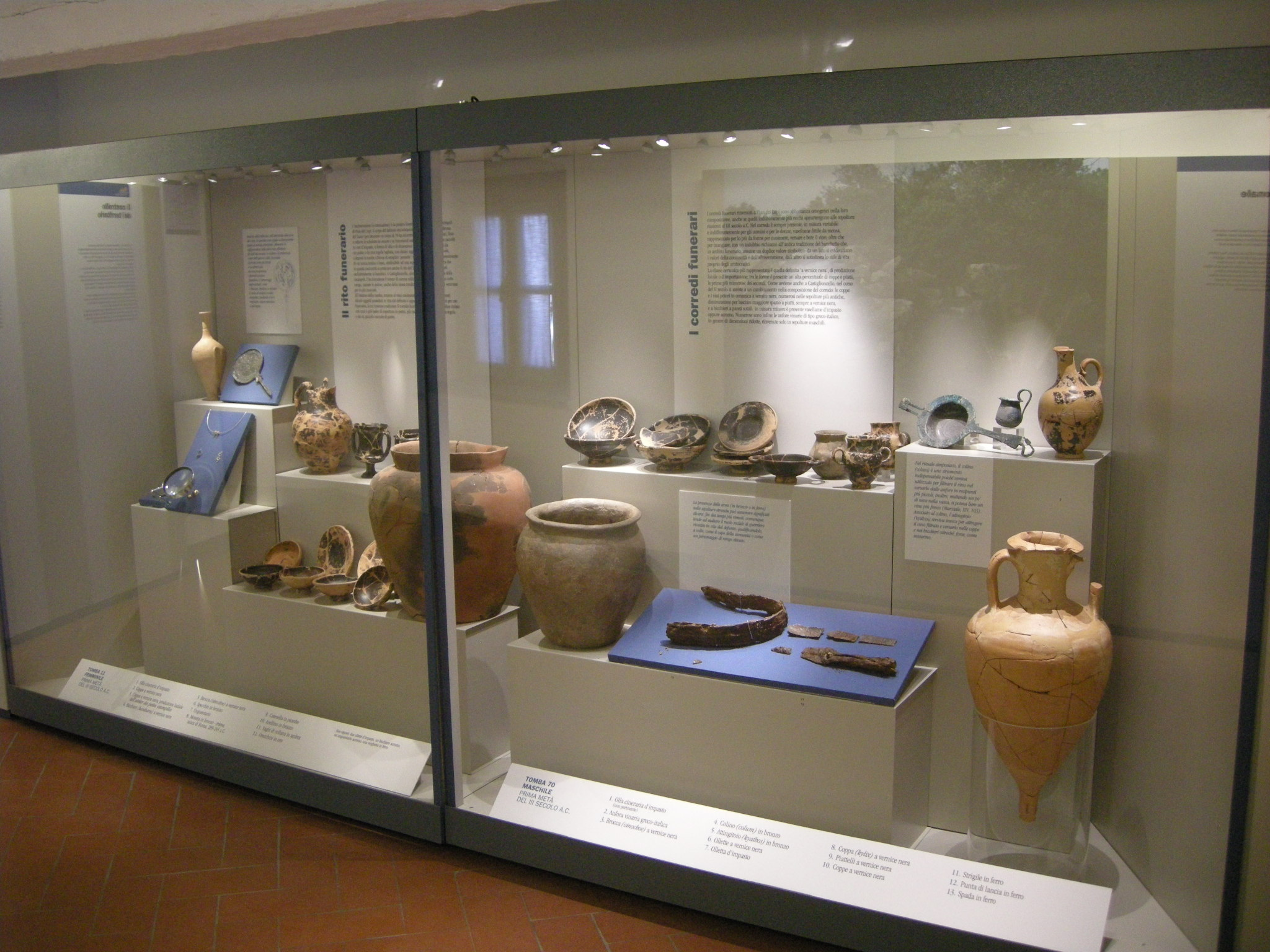 Museo archeologico di Rosignano Marittimo, vetrina